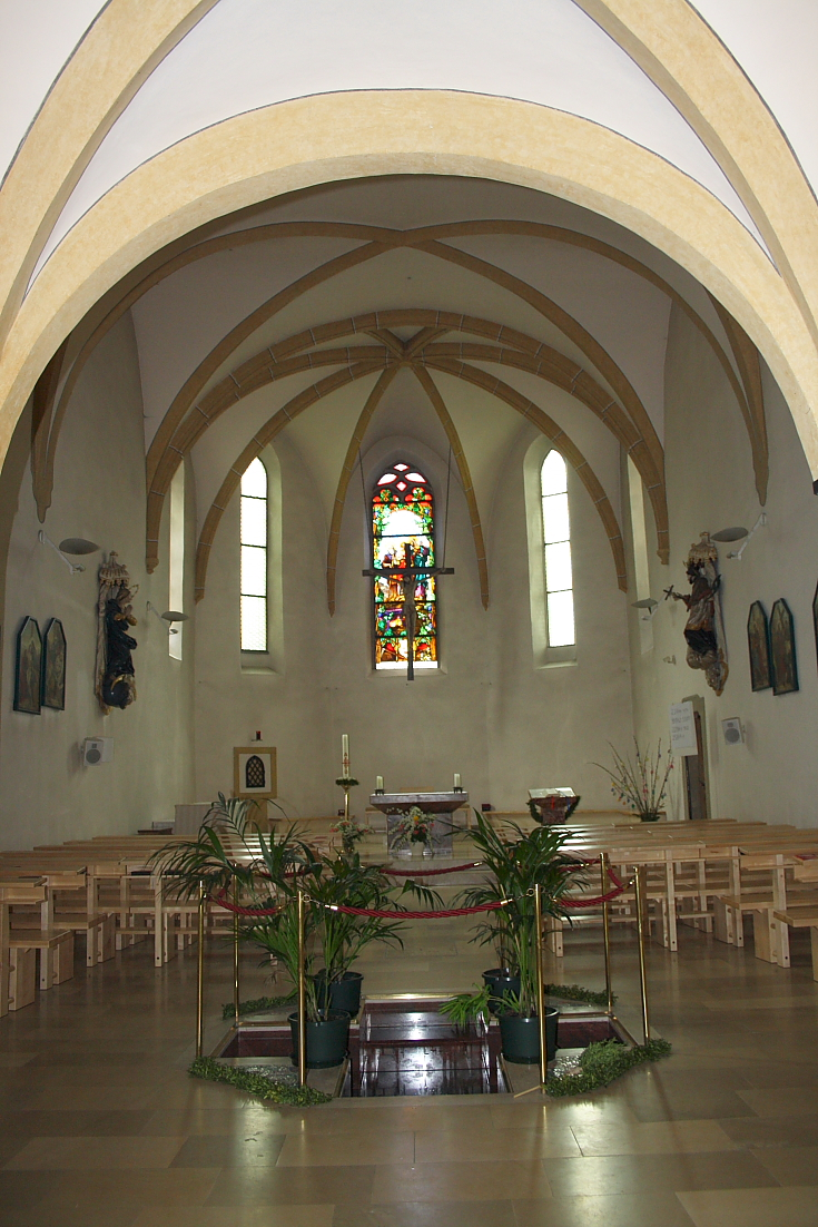 Die Innenansicht der Pfarrkirche von Kirtzendorf mit dem Taufbecken im Boden.